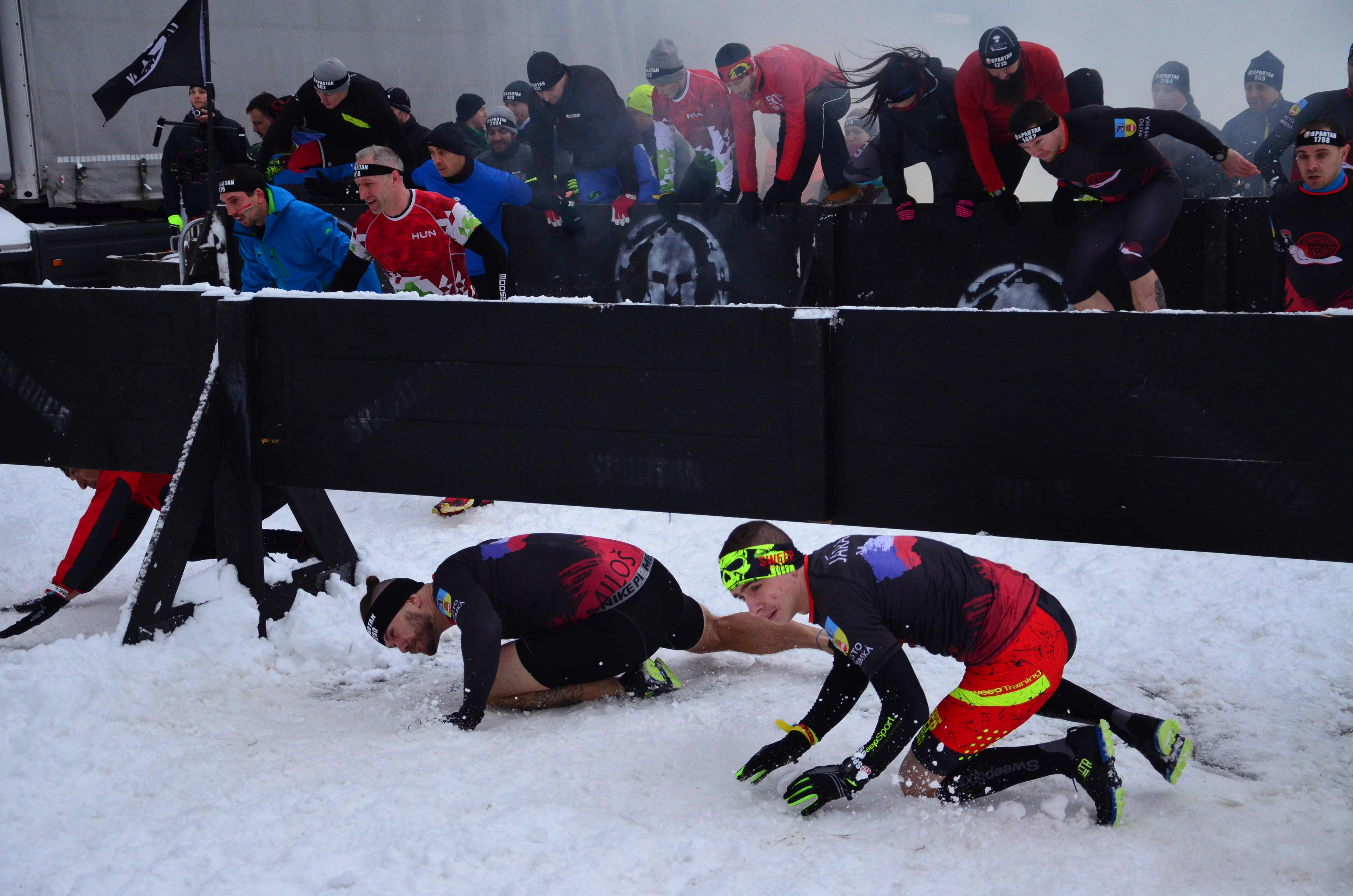 přek